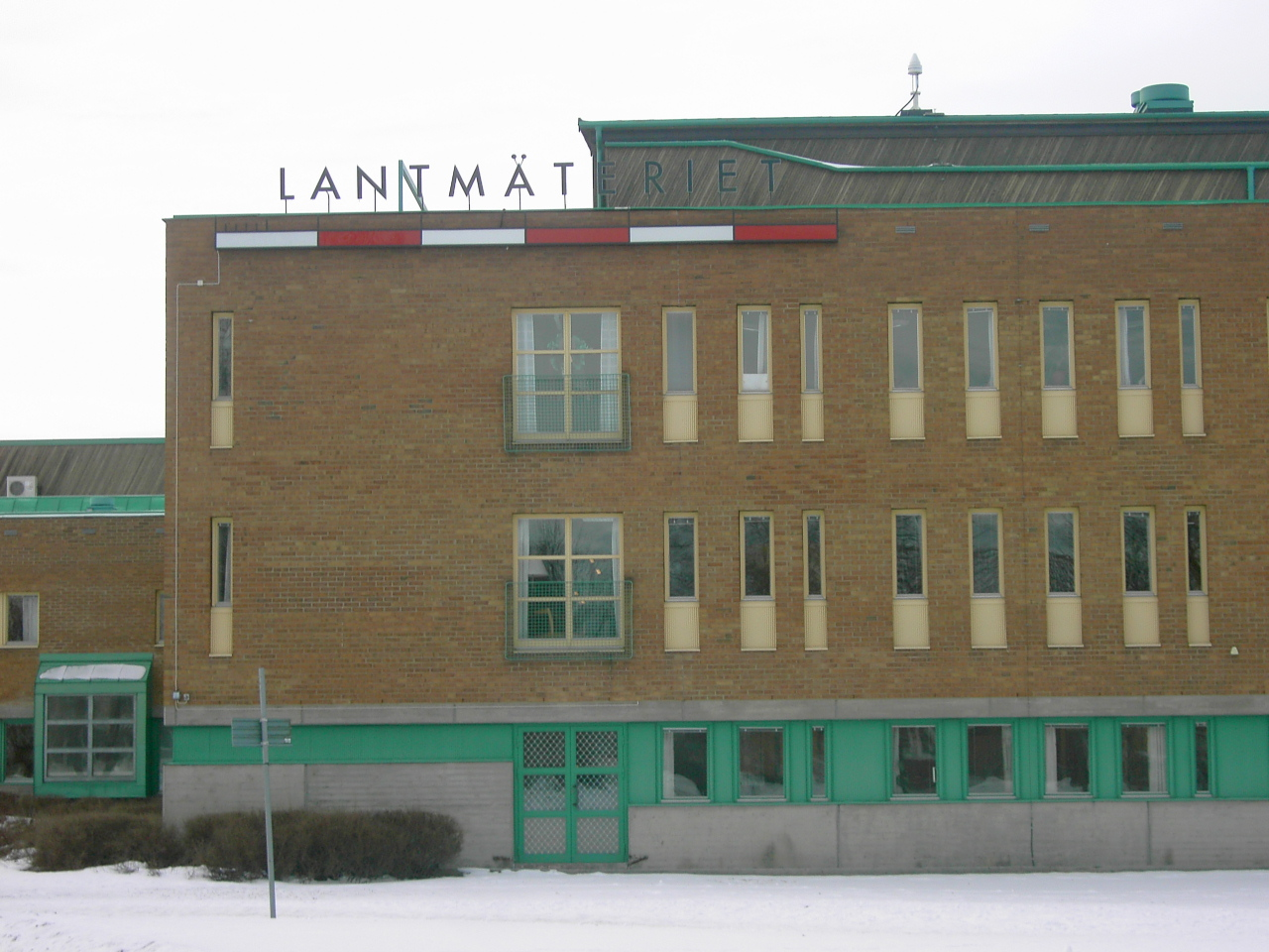 Lantmäteriets huvudkontor i Gävle Foto: Användare:Trebor